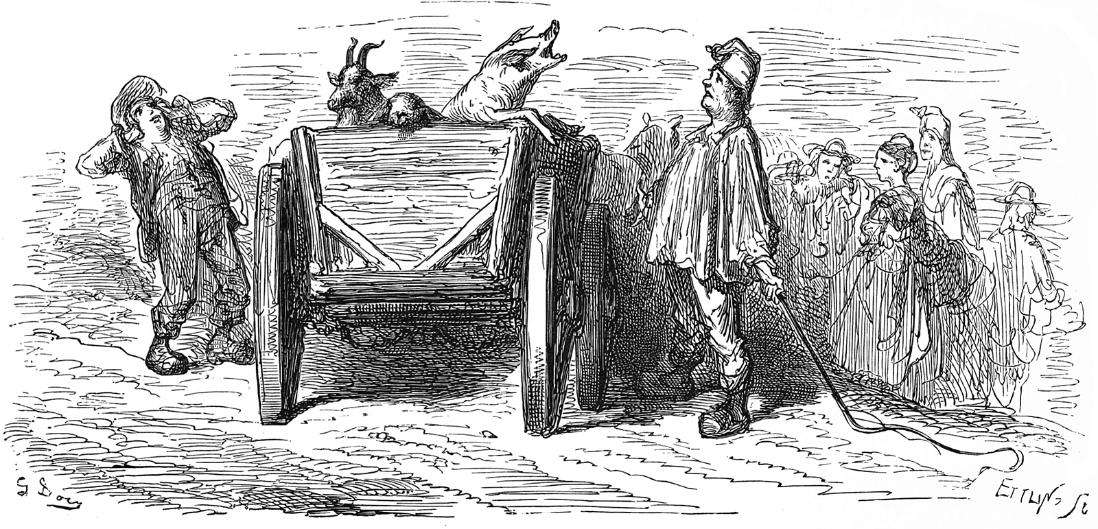 grafika z książki PL Bajki, Jean de La Fontaine, nakładem i drukiem Jana Noskowskiego, Warszawa 1876